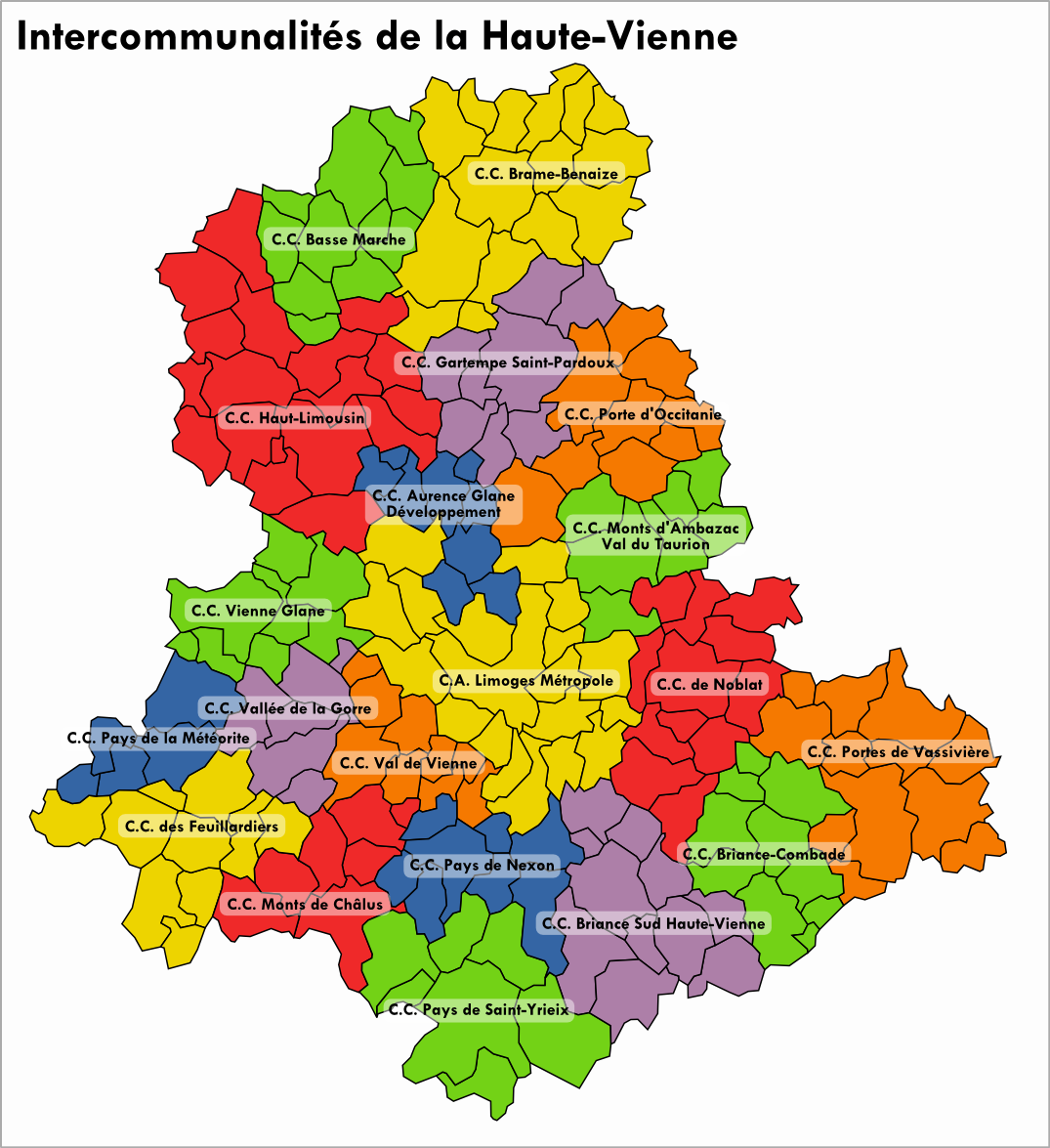 Carte des intercommunalités de la Haute-Vienne